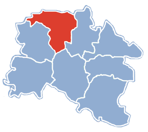 Położenie gminy Kiełczygłów na mapie powiatu pajęczańskiego.